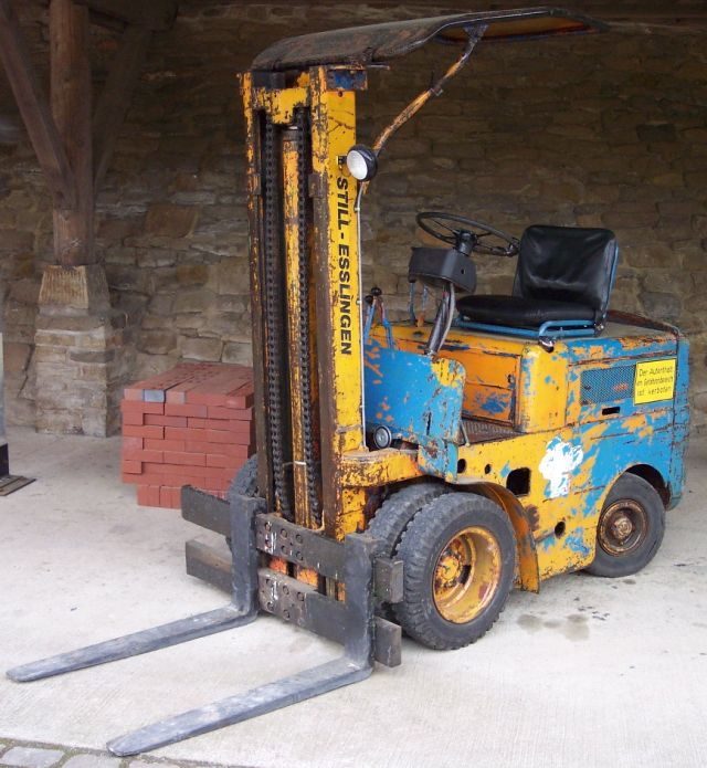 Gabelstapler von Still, nach langen Jahren täglichen Einsatzes ausgemustert, eigenes Bild, gemäß GFDL